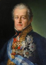 JoseMiguelCarvajalyManriquedeLara